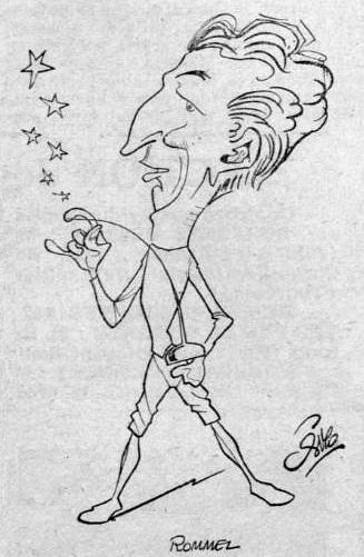 Adrien Rommel, double champion olympique, fleurétiste et épéiste français.